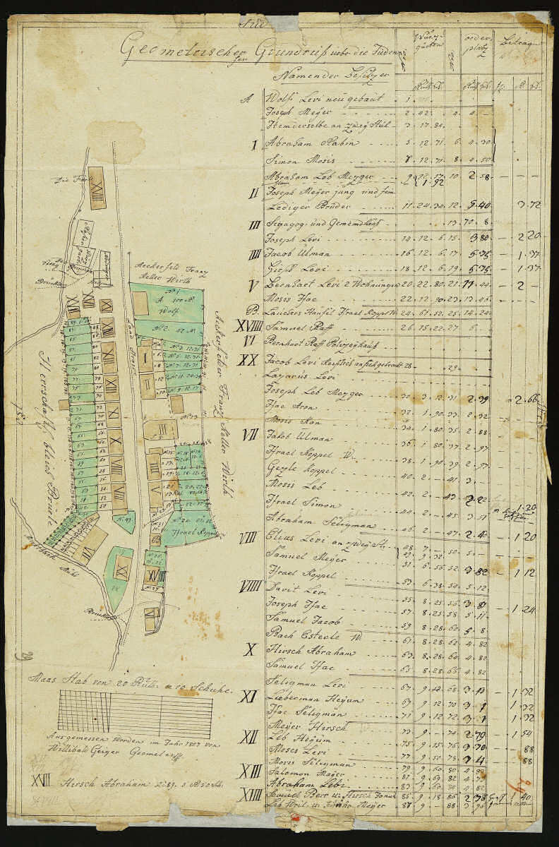 Plan der Judensiedlung in Altenstadt (Iller)